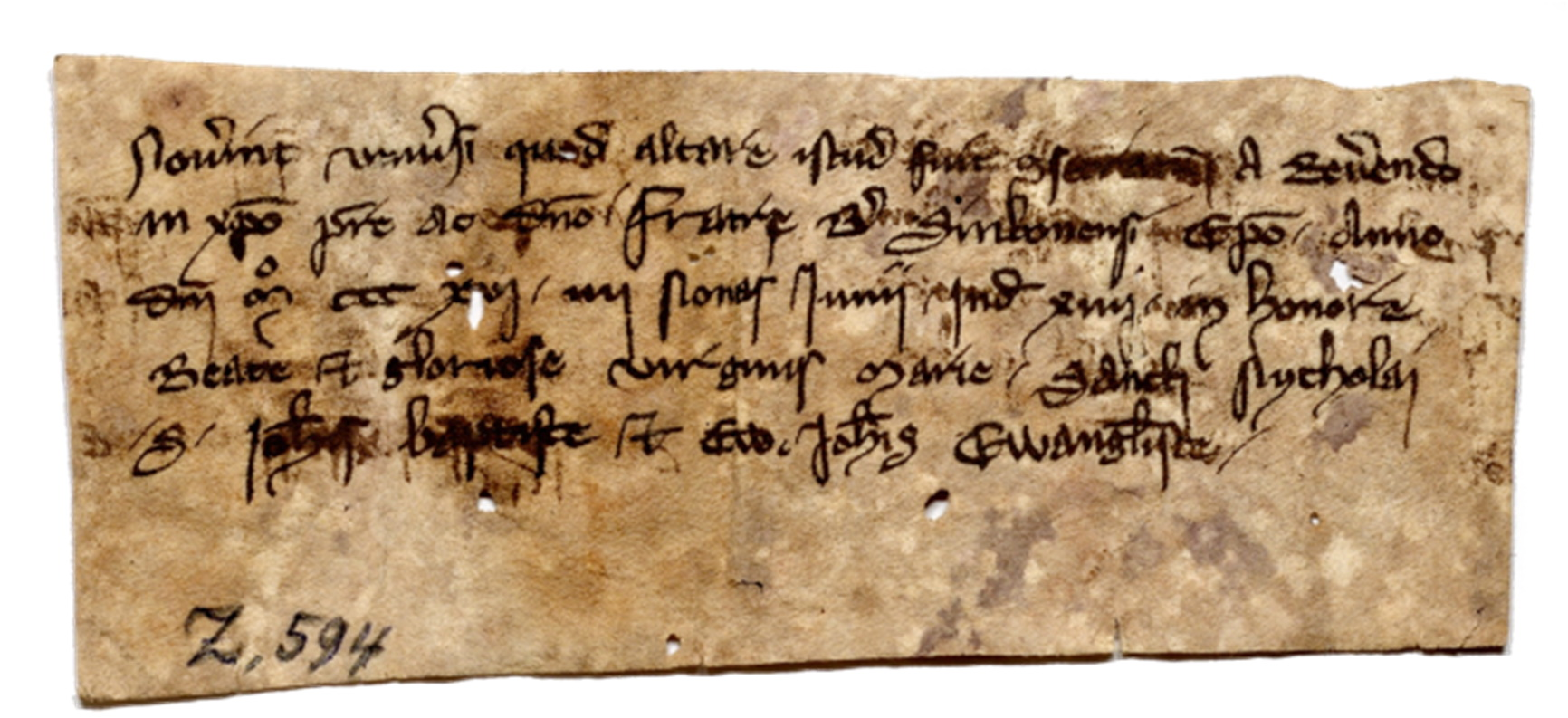 Urkunde der Altarweihe St. Nikolaus am 2. Juni 1316. (Diözesanarchiv Freiburg, Urkunden-Signatur: UZ 645) Durch Weihbischof Berthold von Konstanz.